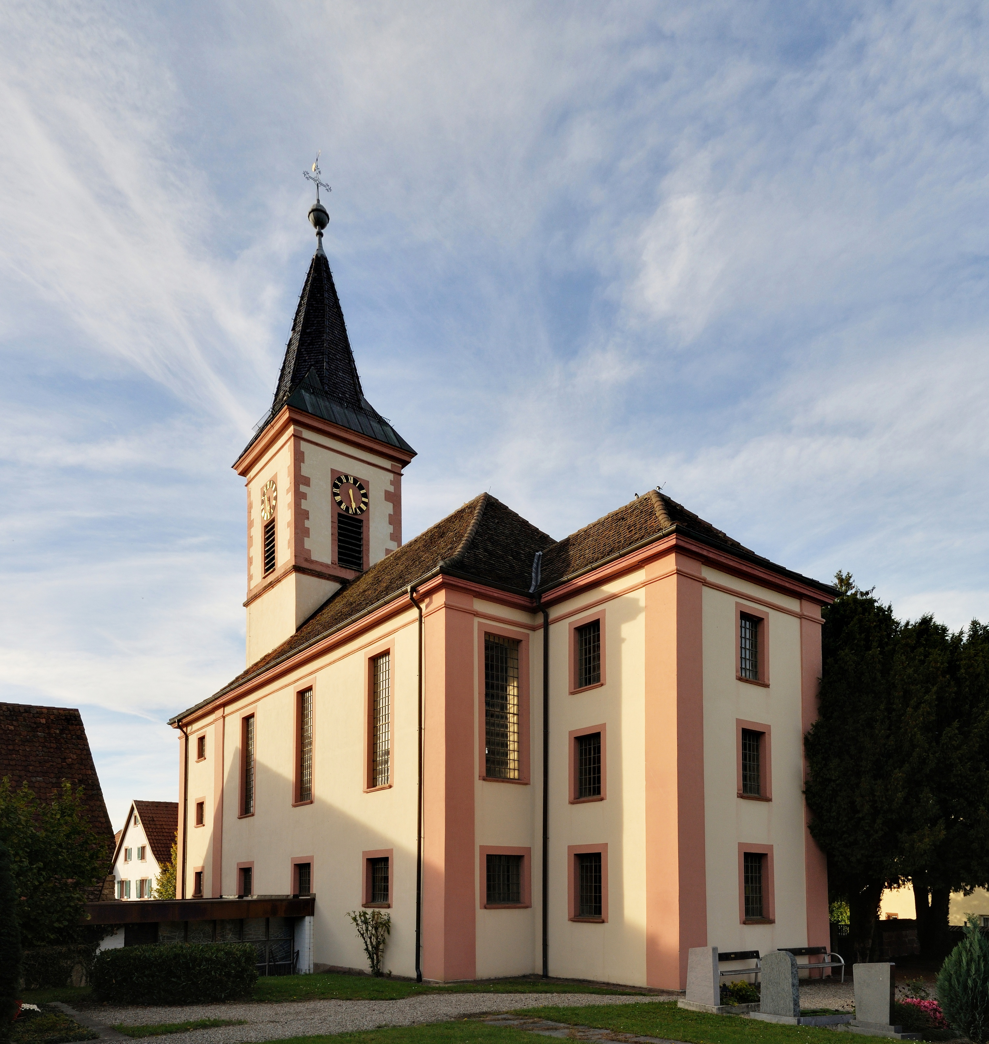 Wittlingen: St. Michael, Chorseite